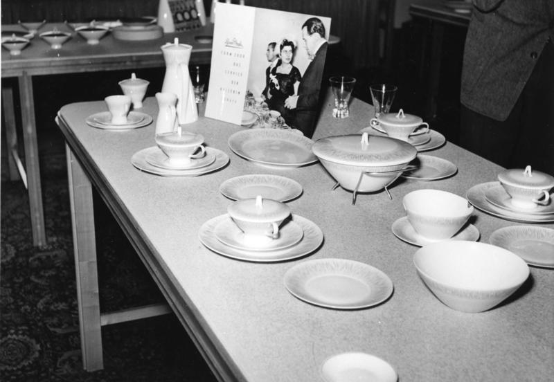 Verein der keramischen Industrie, Selb Ausschnitt aus dem Musterzimmer der Geschirrabteilung Selb der Rosenthal Porzellan A.G. (Stammwerk in Selb). Der Tisch zeigt die Form "2000" mit dem Dekor "Goldstrahlen" und den hierzu passenden Rosenthal-Gläsern.